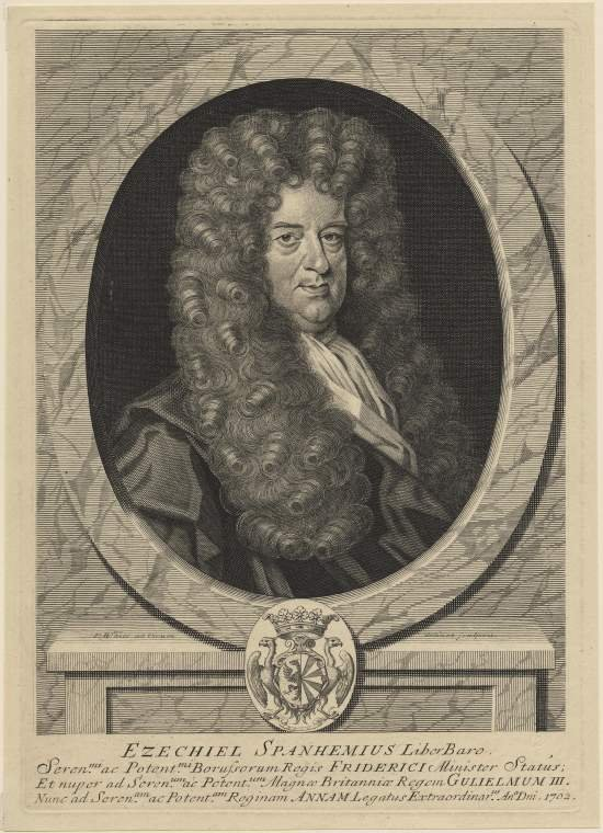 Ezechiel Spanheim (1629-1710), Diplomat, Jurist und Theologe